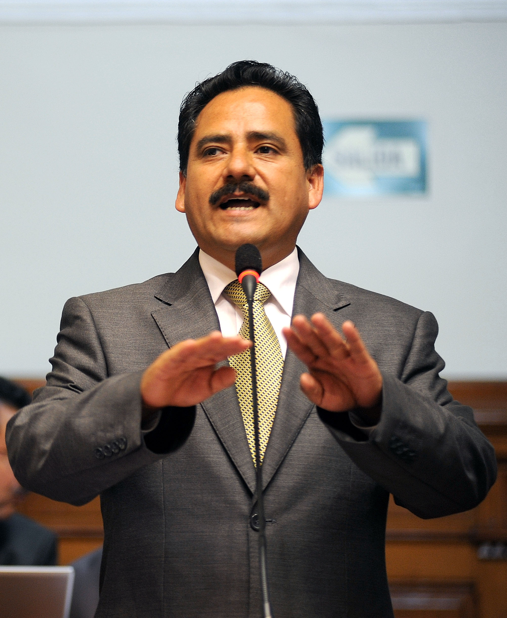 El legislador Edgar Núñez Román expresa su posición en el debate parlamentario realizado esta tarde por el Pleno congresal.